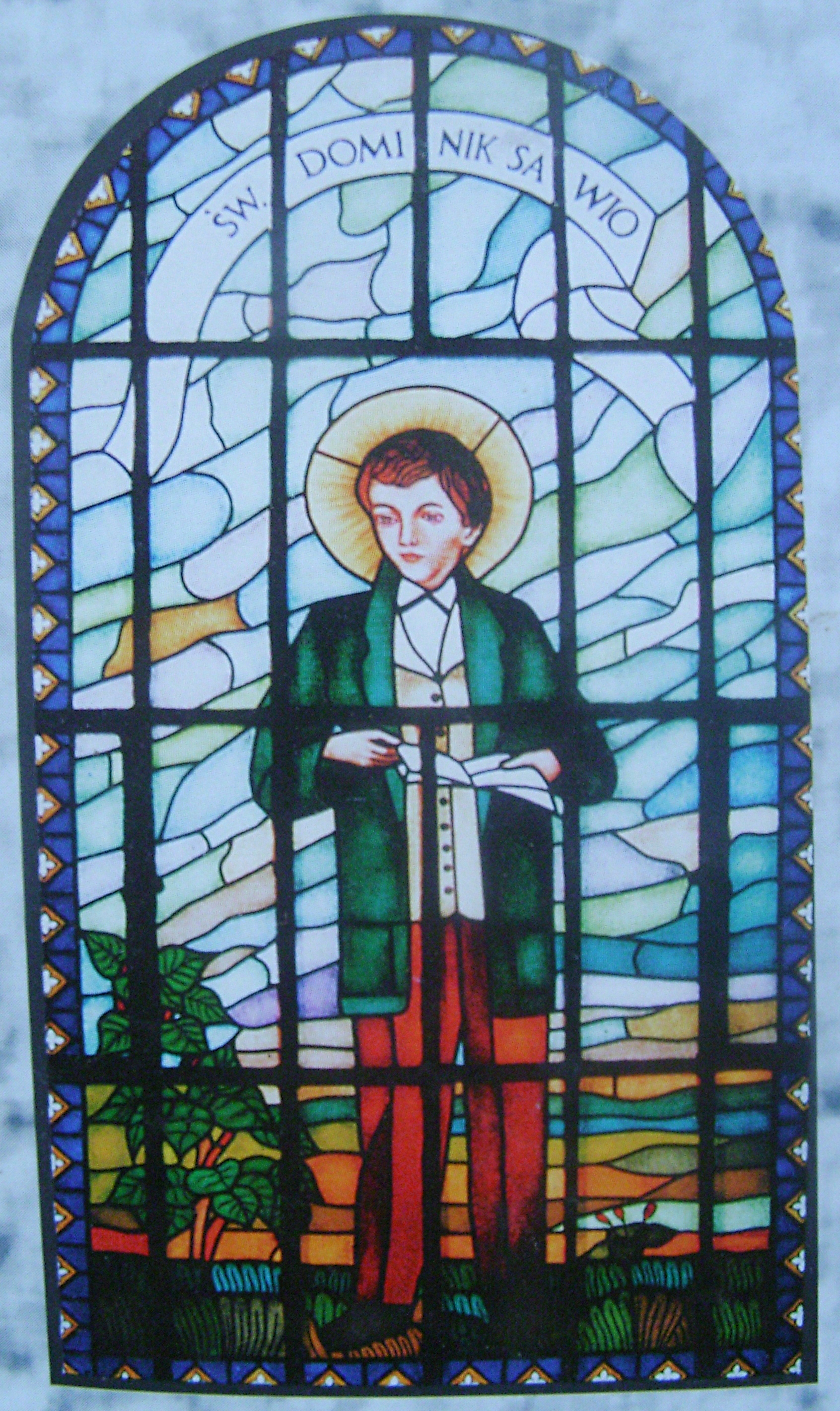 św. Dominik Savio - witraż w kościele Imienia Maryi w Bączalu Dolnym (diecezja rzeszowska)